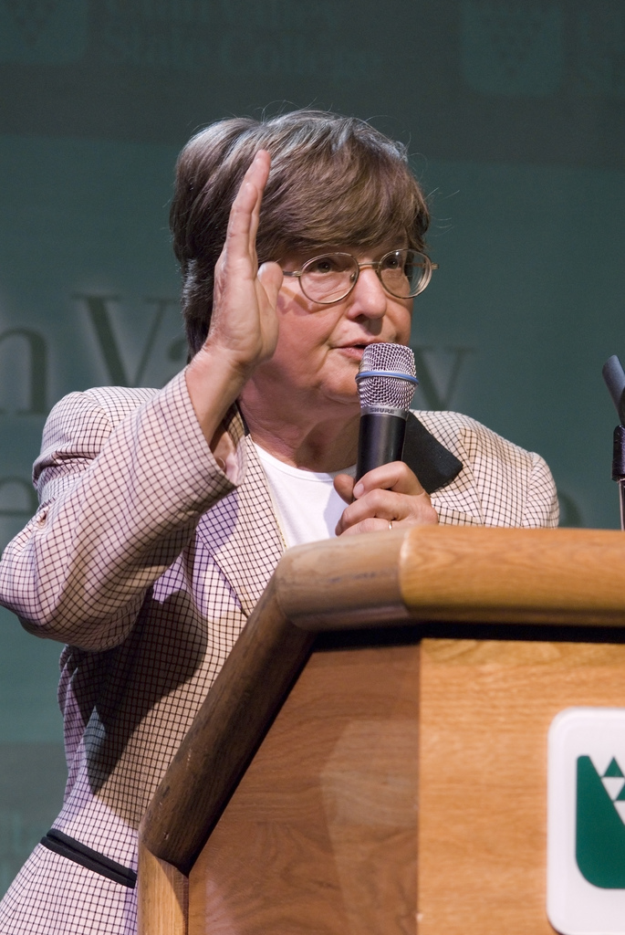 Anti-Death Penalty crusader Sister Helen Prejean